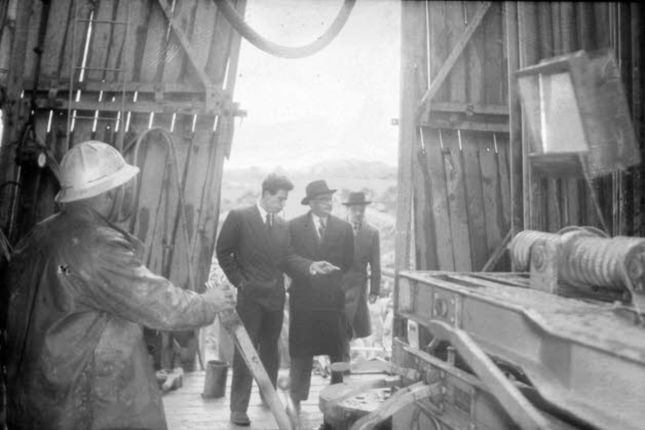 Edgar Faure visitant un puits de sondage à Lons-le-Saunier